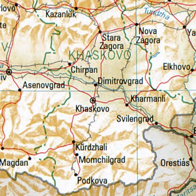 Lage der Städte Chaskowo und Dimitrowgrad in Bulgarien